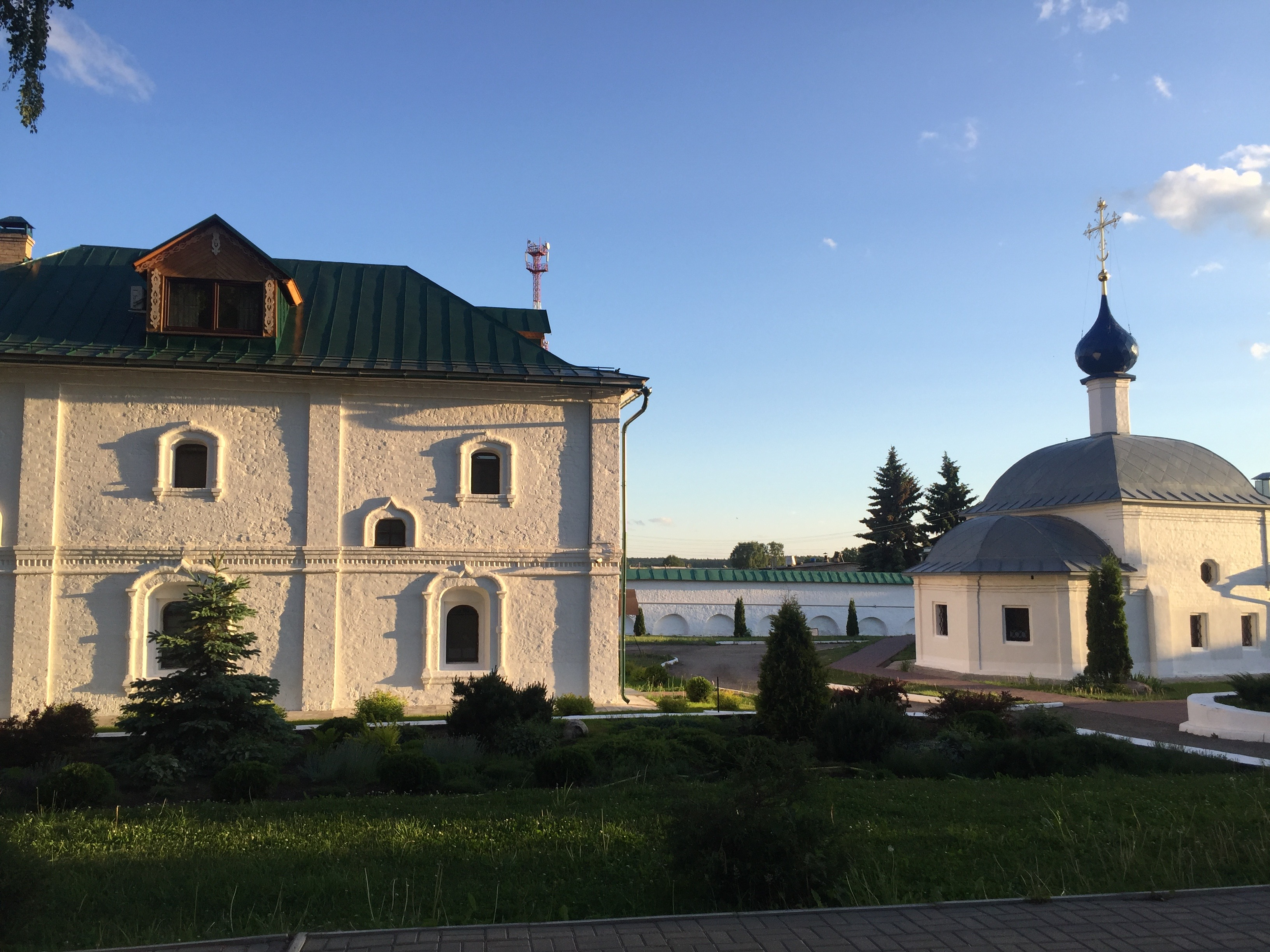 Феодоровский монастырь